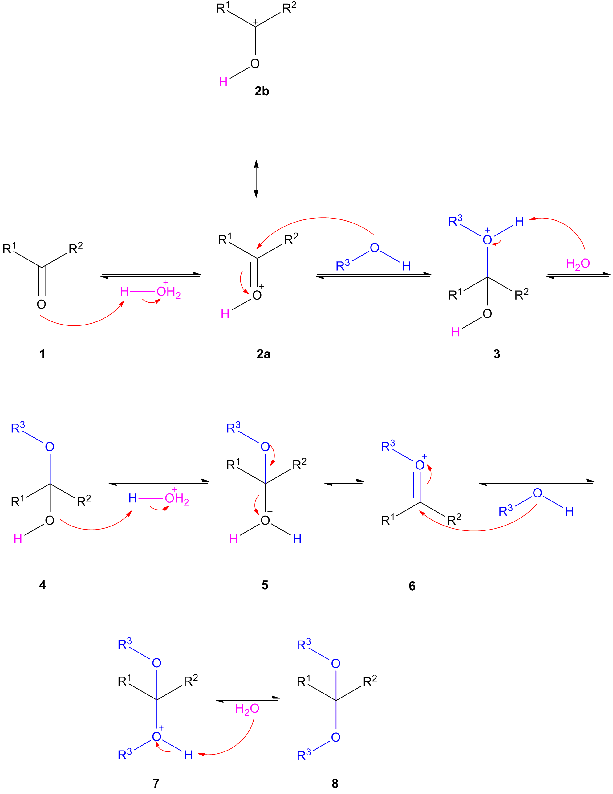 Acetalisation